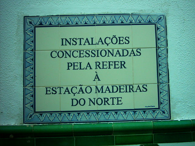 São Mamede (Linha do Oeste): estação. «Instalações concessionadas pela REFER à Estação de Madeiras do Norte»